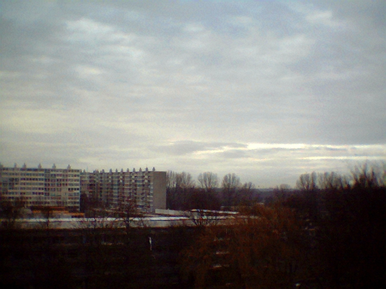 Sky over Overvecht at noon (Testing toy cam) Categorie:Afbeeldingen Overvecht